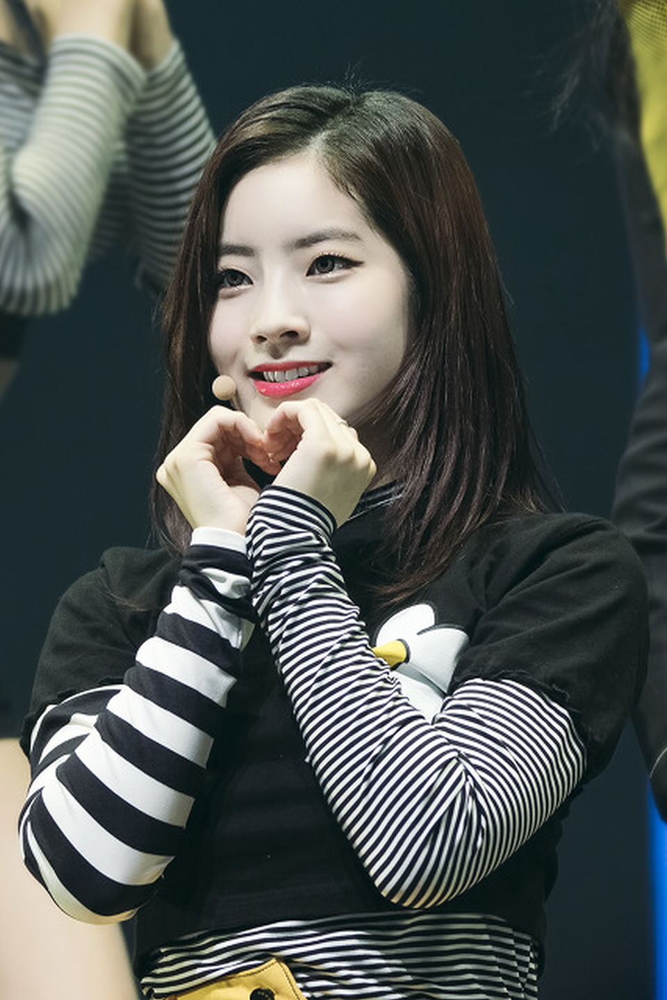 171030 트와이스 LIKEY 쇼케이스 다현 (2)